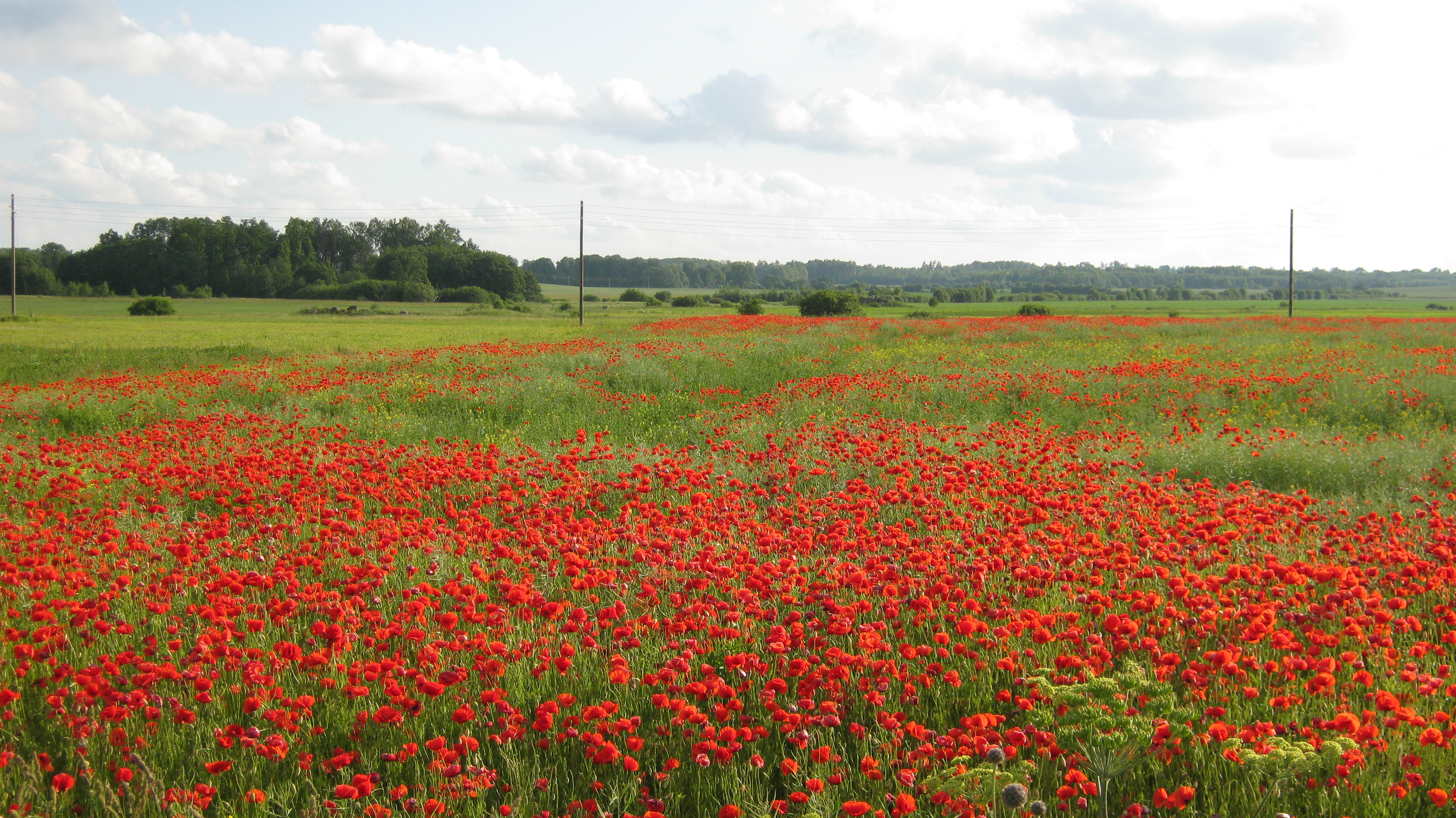 Poppy field